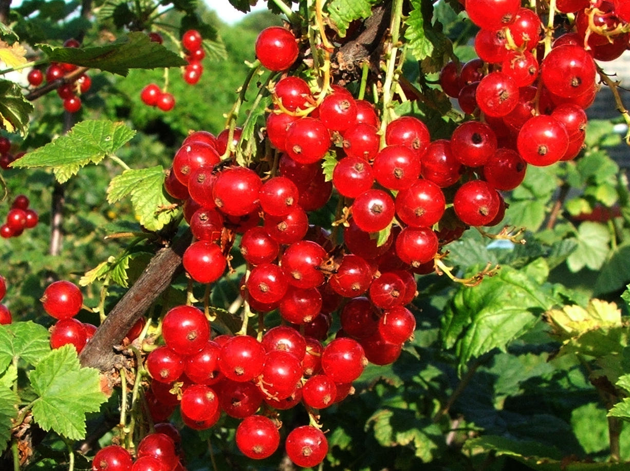 Ribes rubrum (pl. porzeczka czerwona)